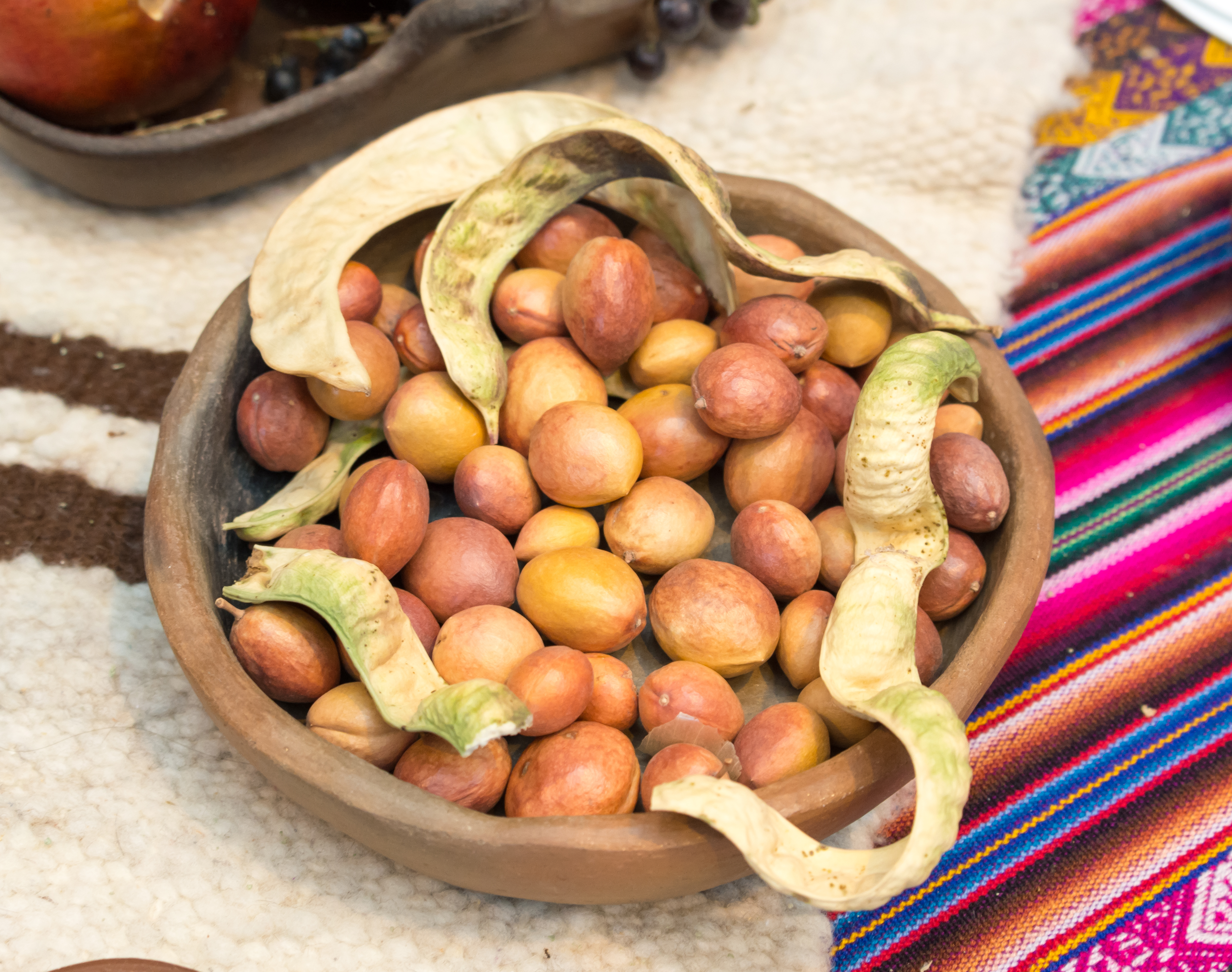 Feria vacaciones tercera edad Sernatur 2019, Providencia, Santiago, Chile.